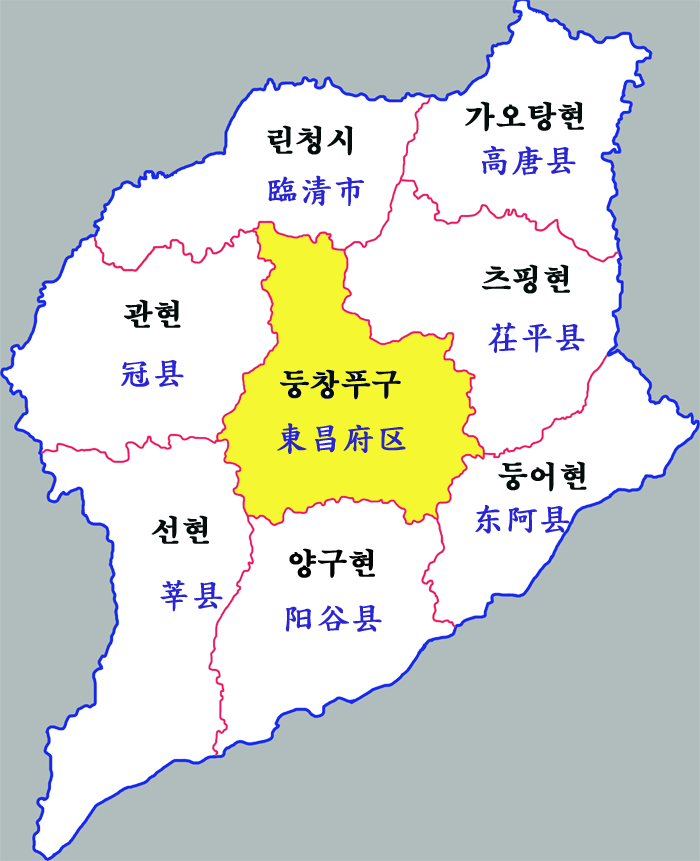 랴오청시 현급구역